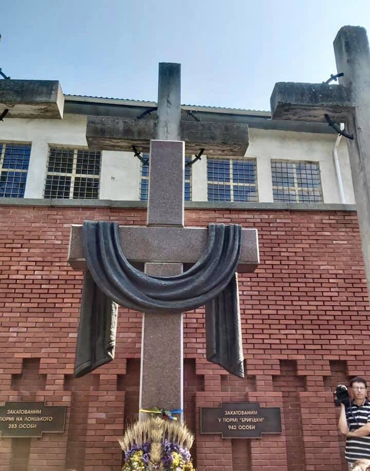 Меморіал, фото центральної частини